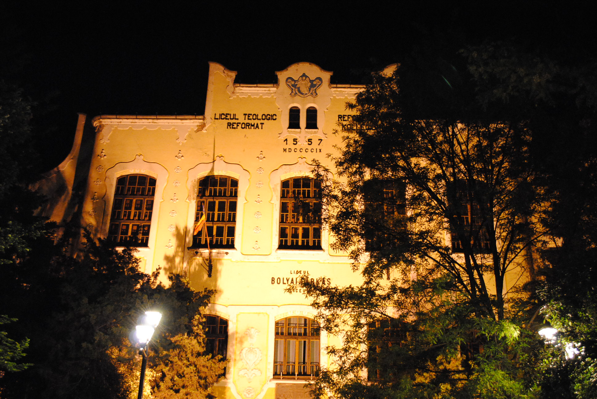 Ansamblul liceului "Bolyai Farkas" 1908